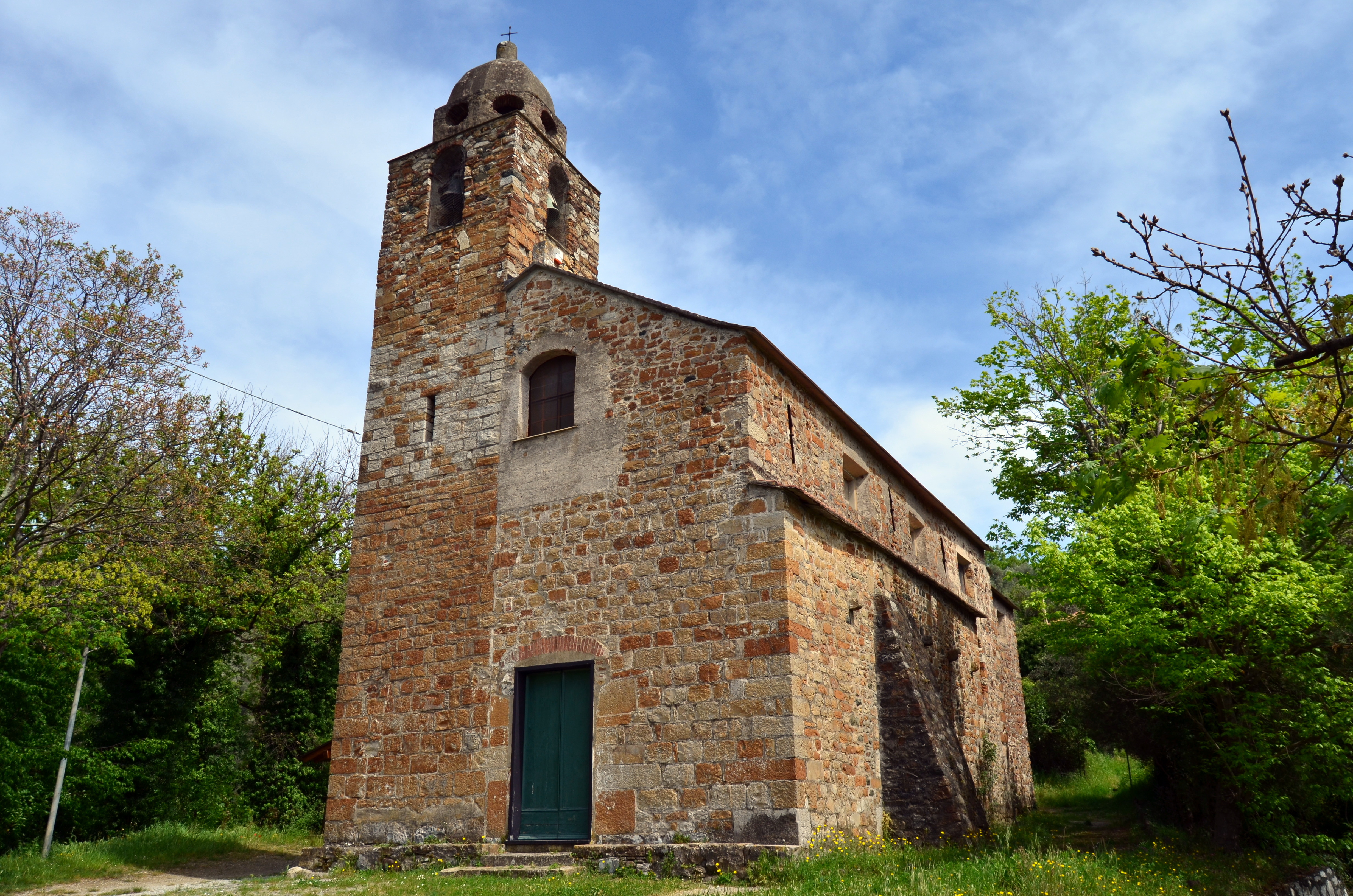 La chiesa di San Giovanni Battista, Casarza Ligure, Liguria, Italia